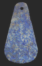 A Mesopotamian Lapis Lazuli Pendant - circa 2900 BC.